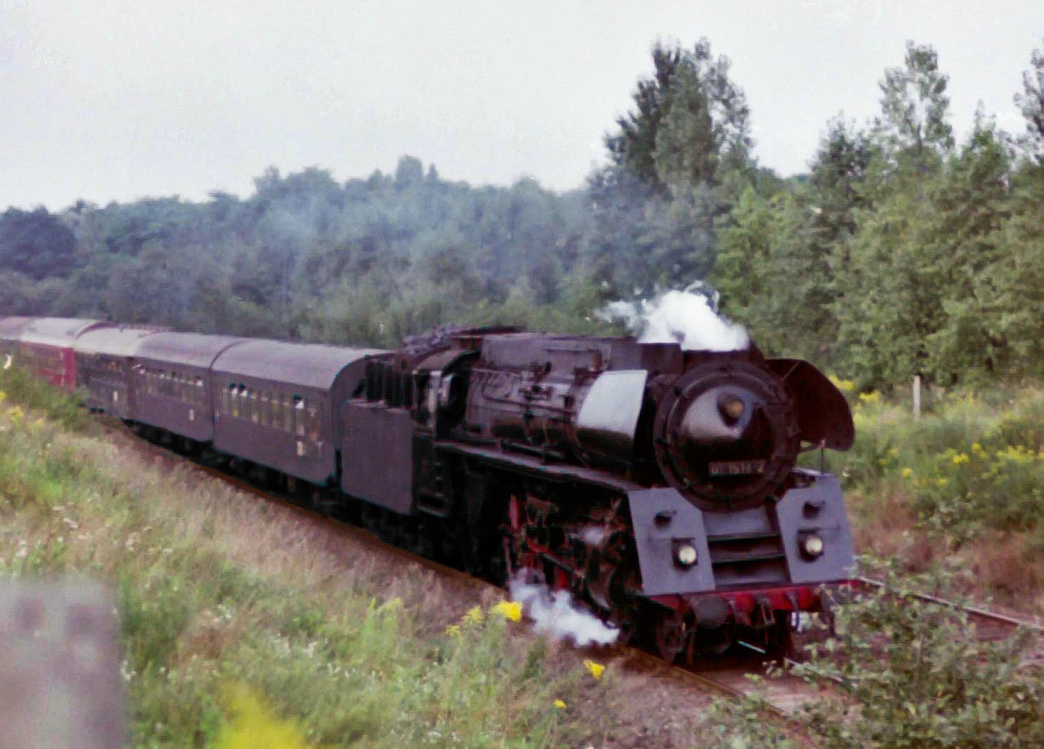 Dampflokomotive ist drei Monate vor der Kesselexplosion in Bitterfeld.